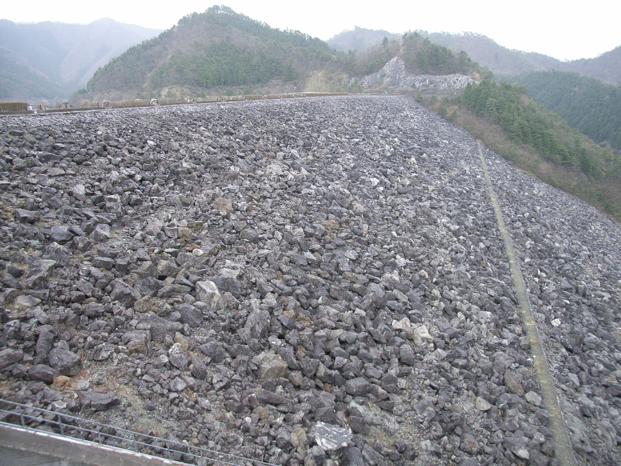 黒川ダム 兵庫県朝来市生野町（旧朝来郡生野町）黒川地先 ～photo by Autumn Snake 【おぉたむ すねィく探検隊】写真部門 担当 大原佳苗